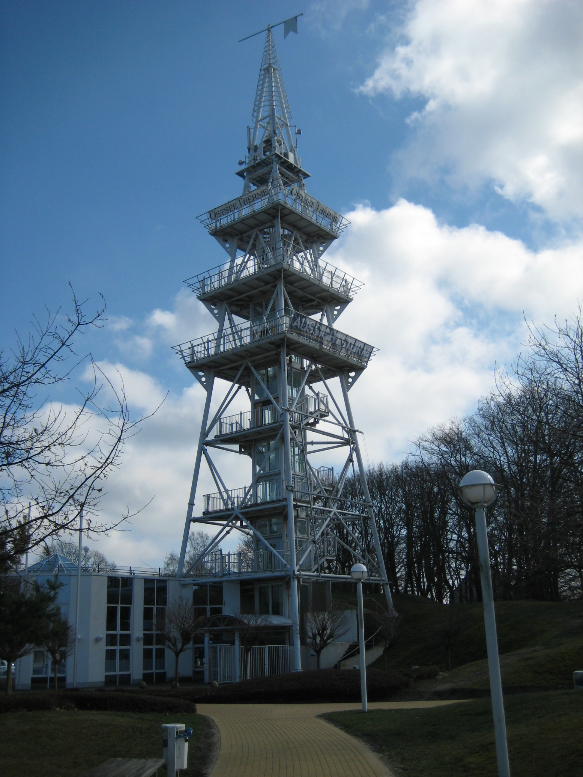 Aussichtsturm - Ostseetherme Ahlbeck